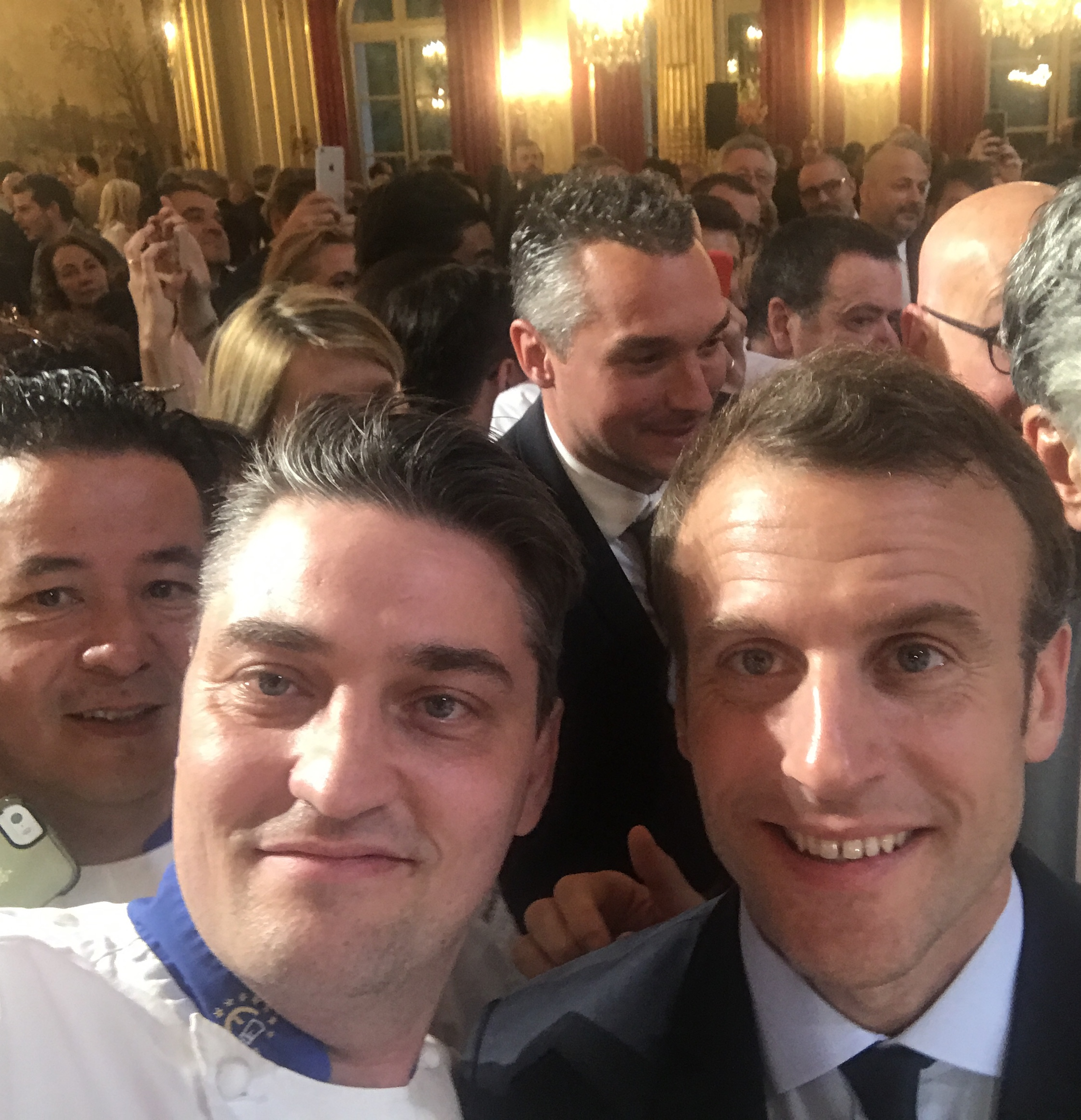 moi et le président de la république